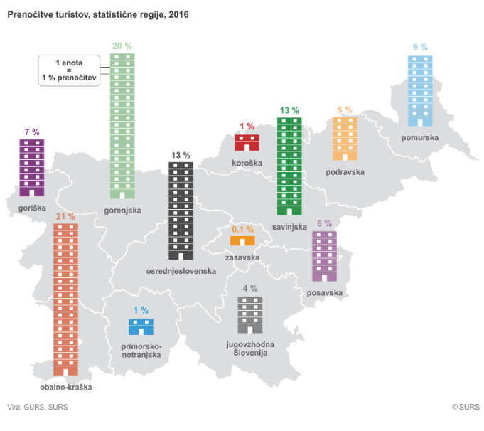 Prenočitve turistov, statistične regije, 2016